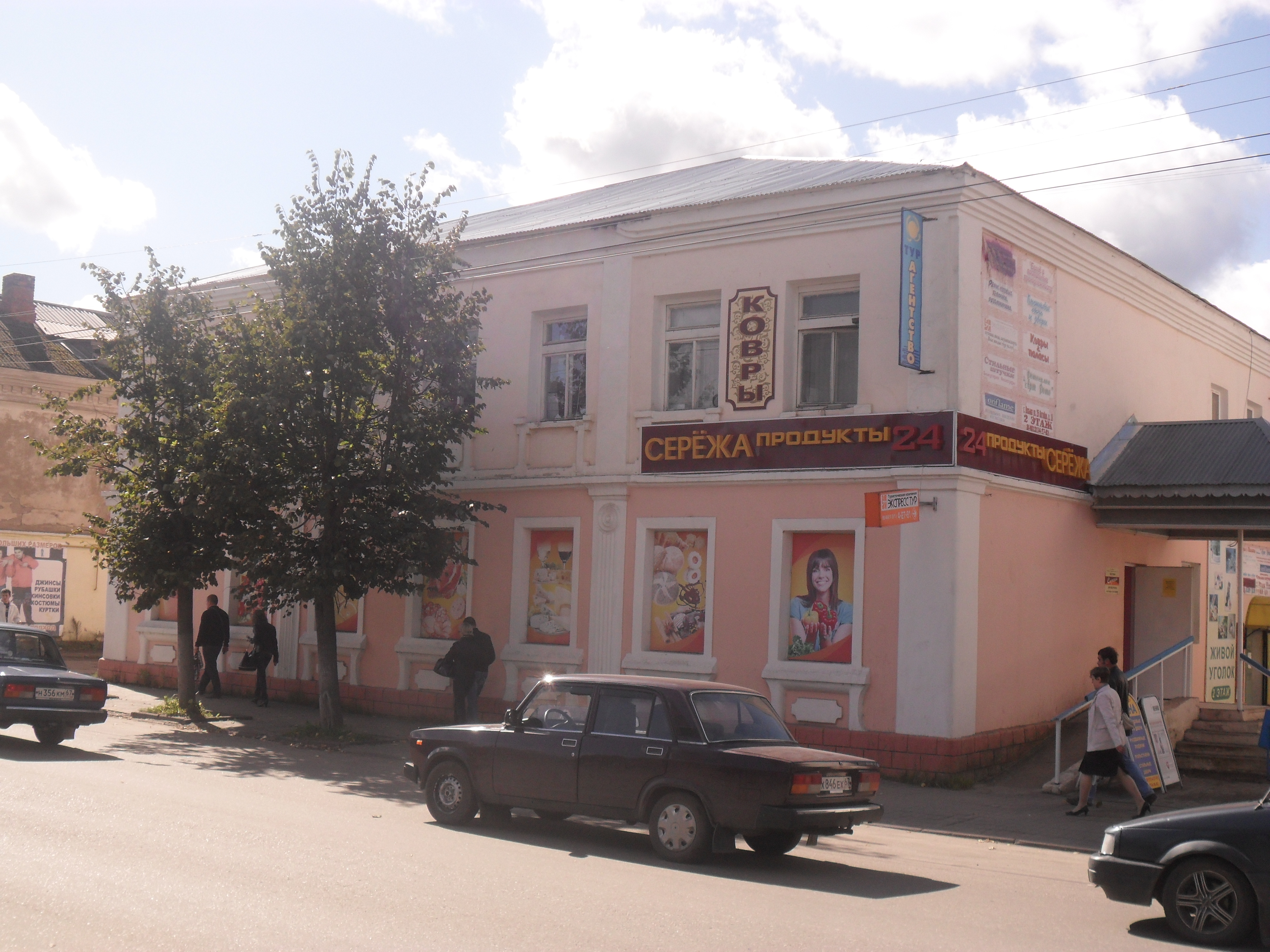 Памятник архитектуры регионального значения. Дом Лютова 2-й половины XIX века.